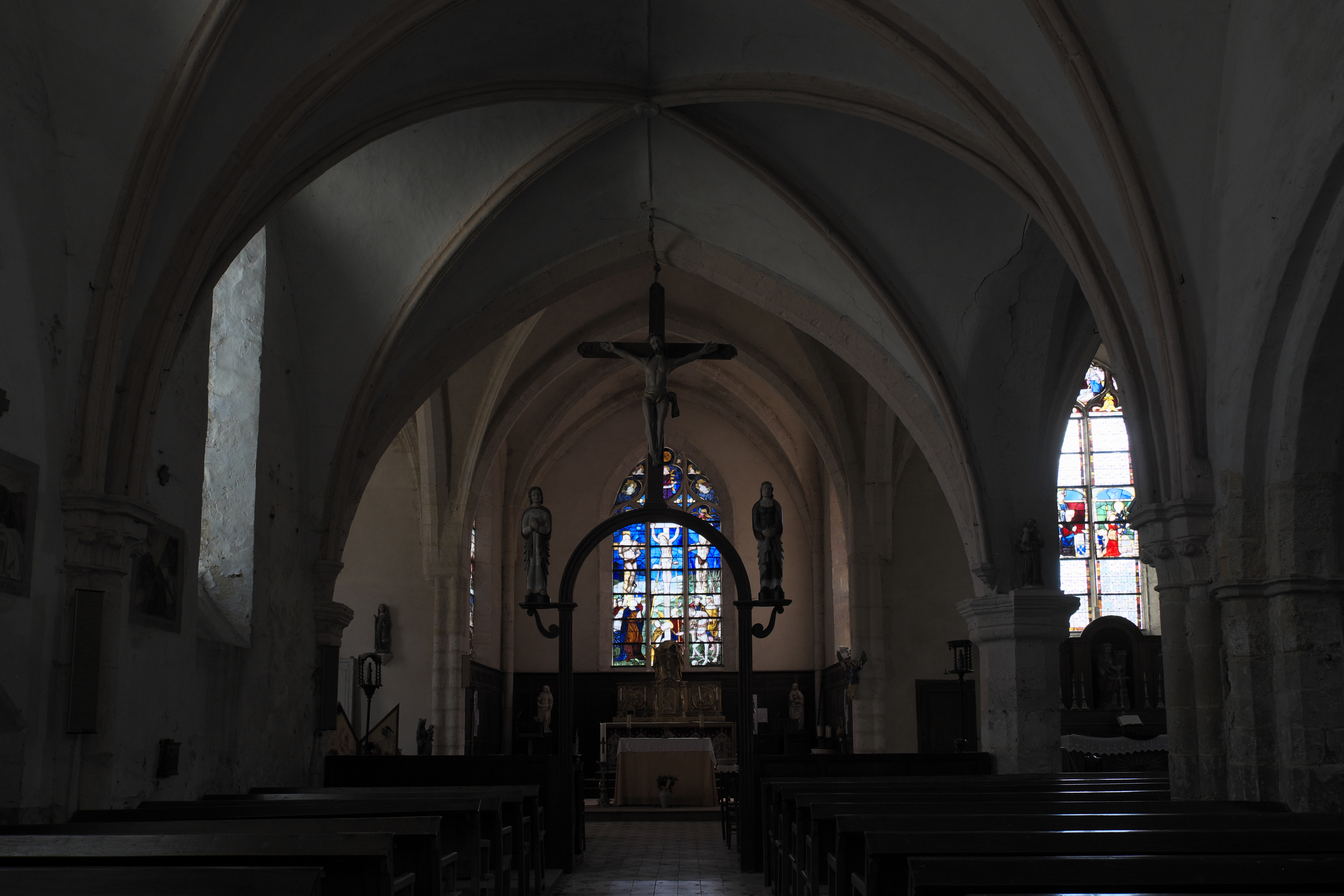 Kirche Sainte-Osmanne in Féricy im Département Seine-et-Marne (Île-de-France/Frankreich), Innenraum